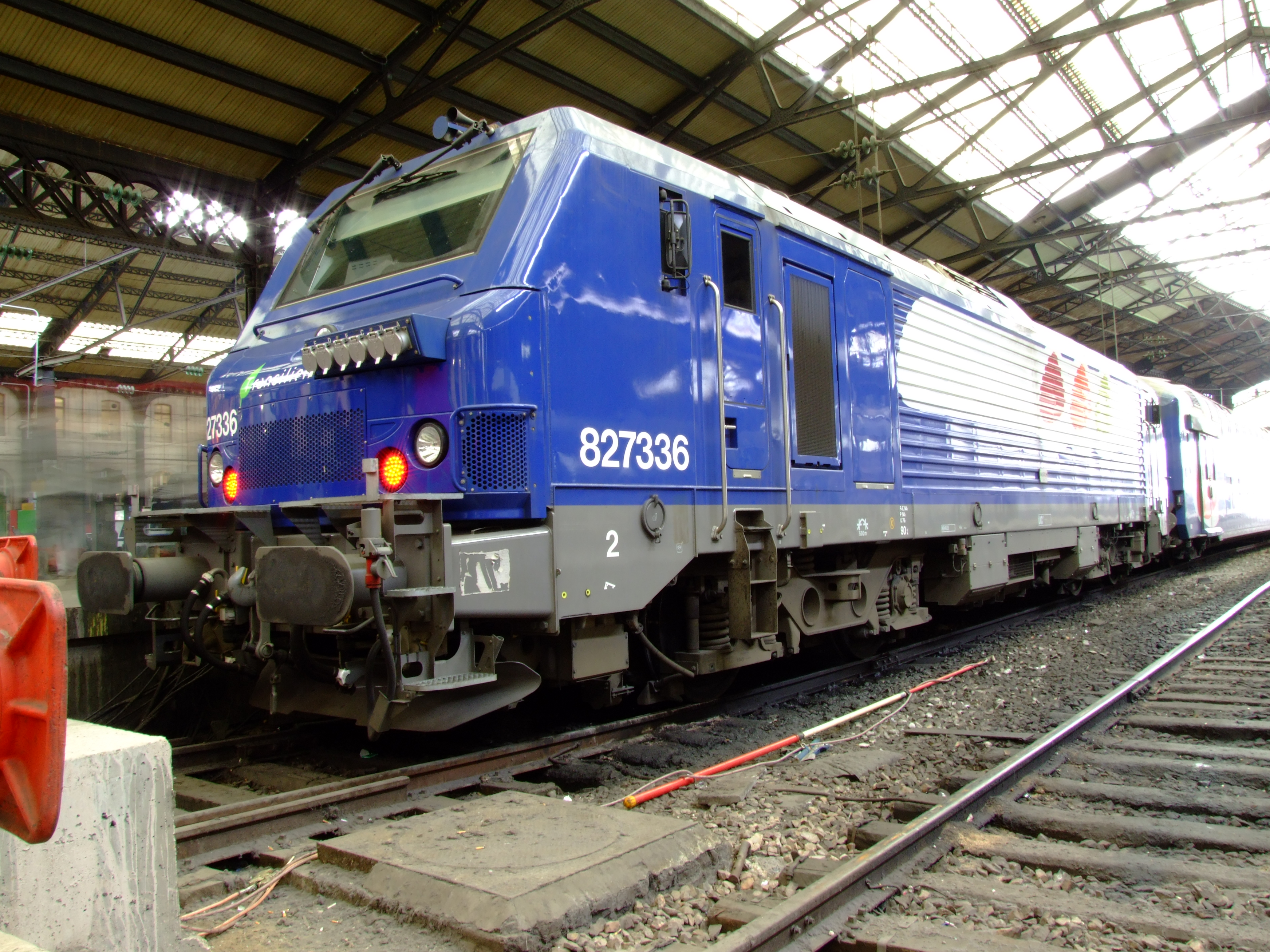 SNCF Transilien 827336